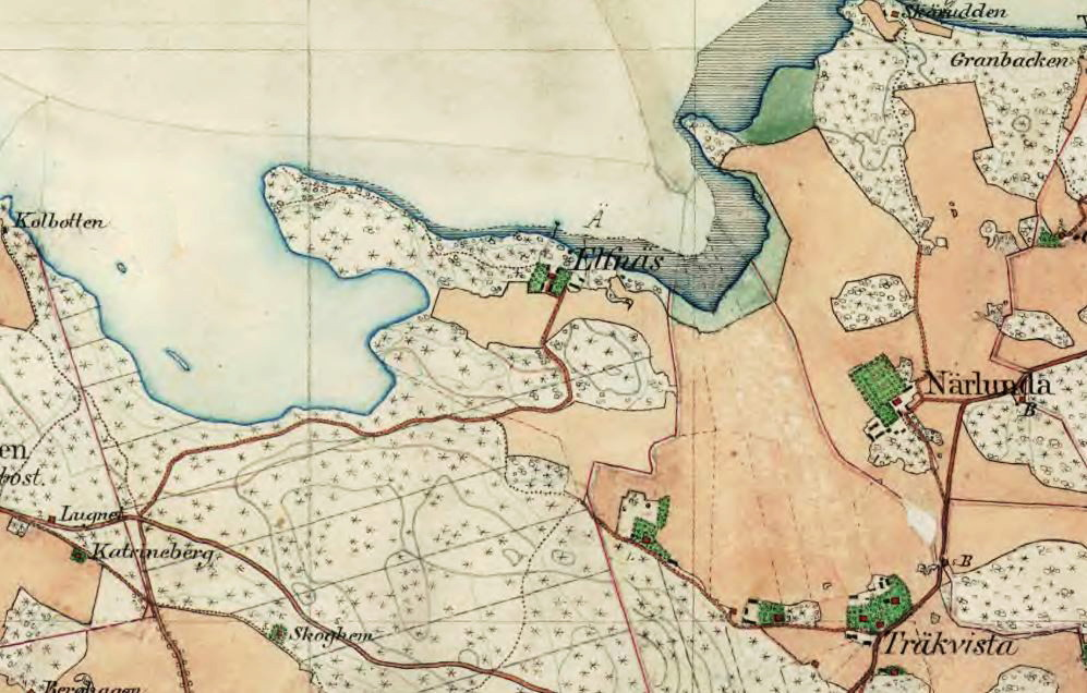 Älvnäs och omgivning på Häradsekonomiska kartan